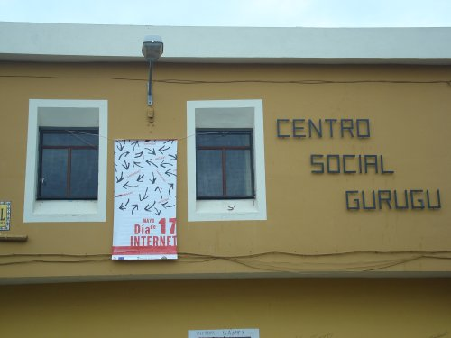 Estremeñu: Centros Social del Gurugú